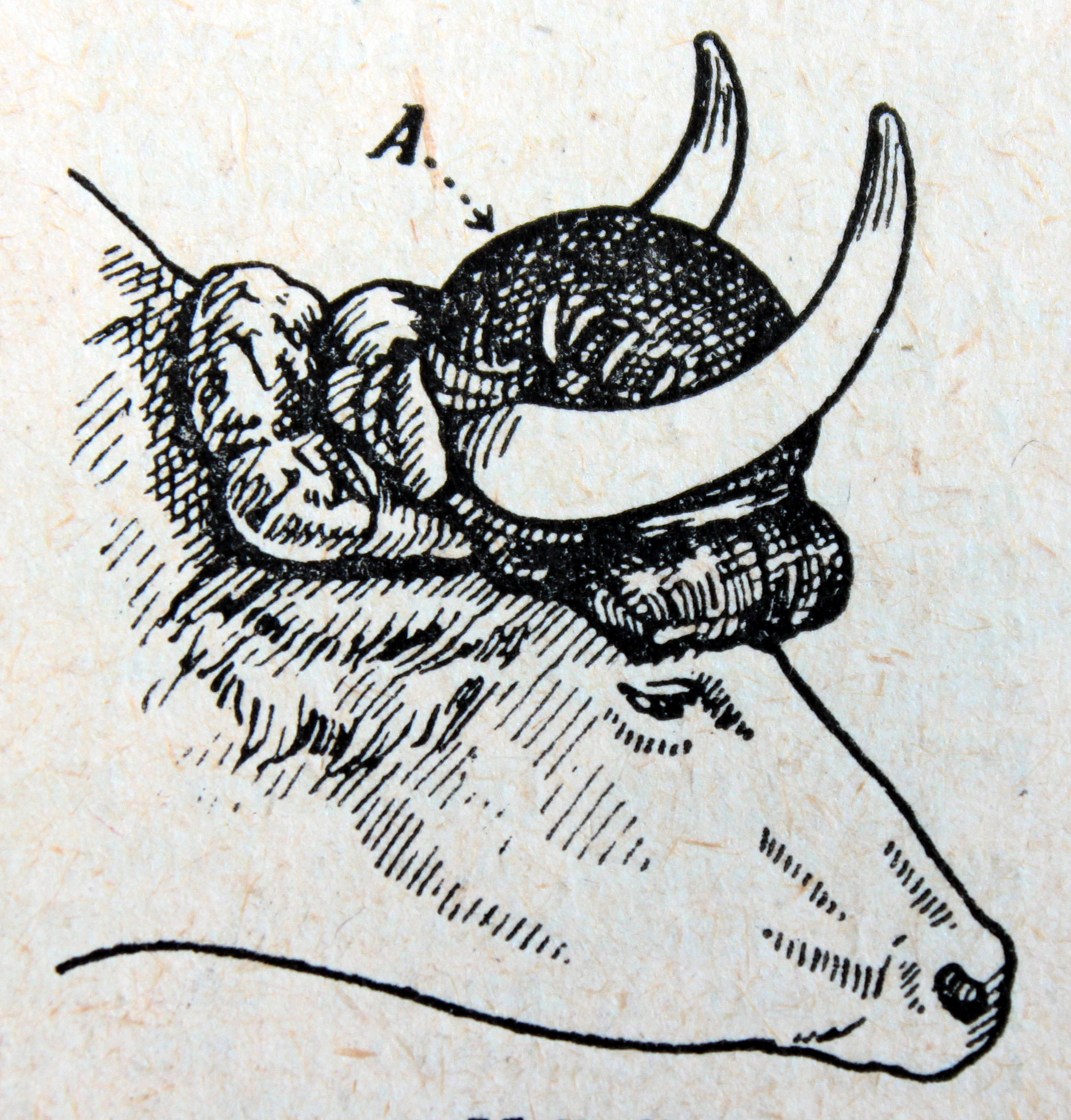 Esquema proveniente do Lello universal em 2 volumes: novo dicionário enciclopédico luso-brasileiro / organizado e publicado pela Livraria Lello sob a direcção de João Grave e Coelho Netto. - Porto : Lello & Irmao, [1940?]